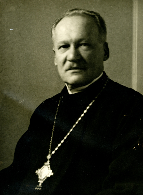 Епископ Гельсингфорский Александр (Карпин)